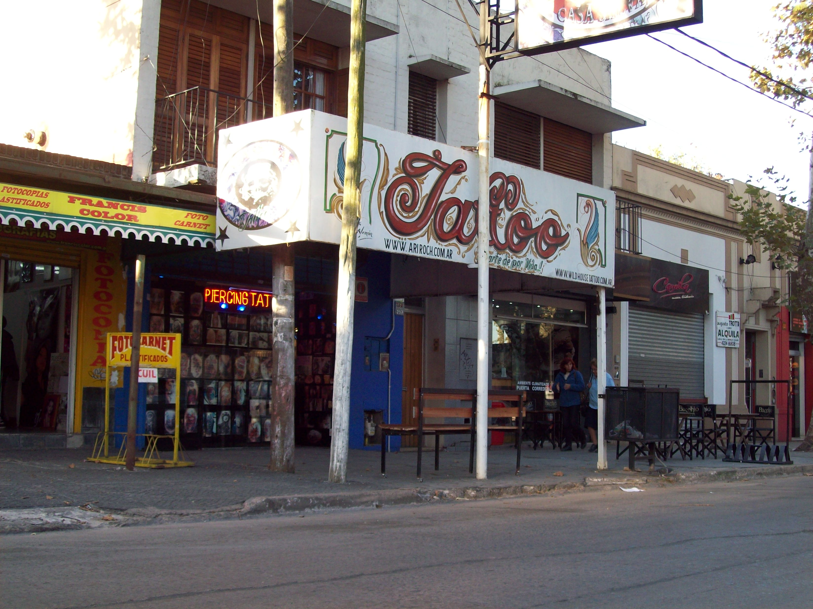 Casa de Nicoas Boccuzzi, actual casa de tatuajes.